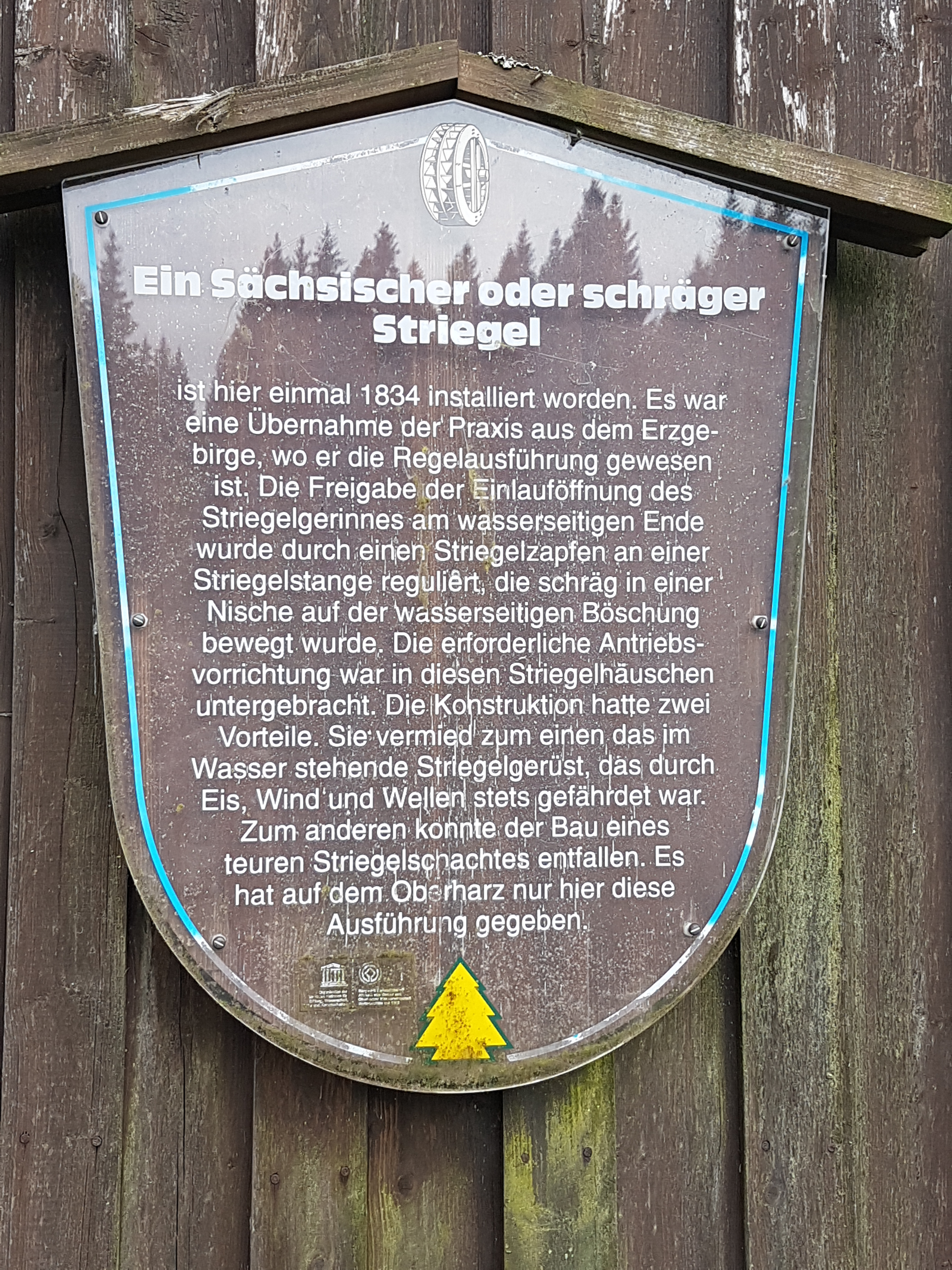 10.1-Infotafel Sächsischer Striegel, 26-05-2019